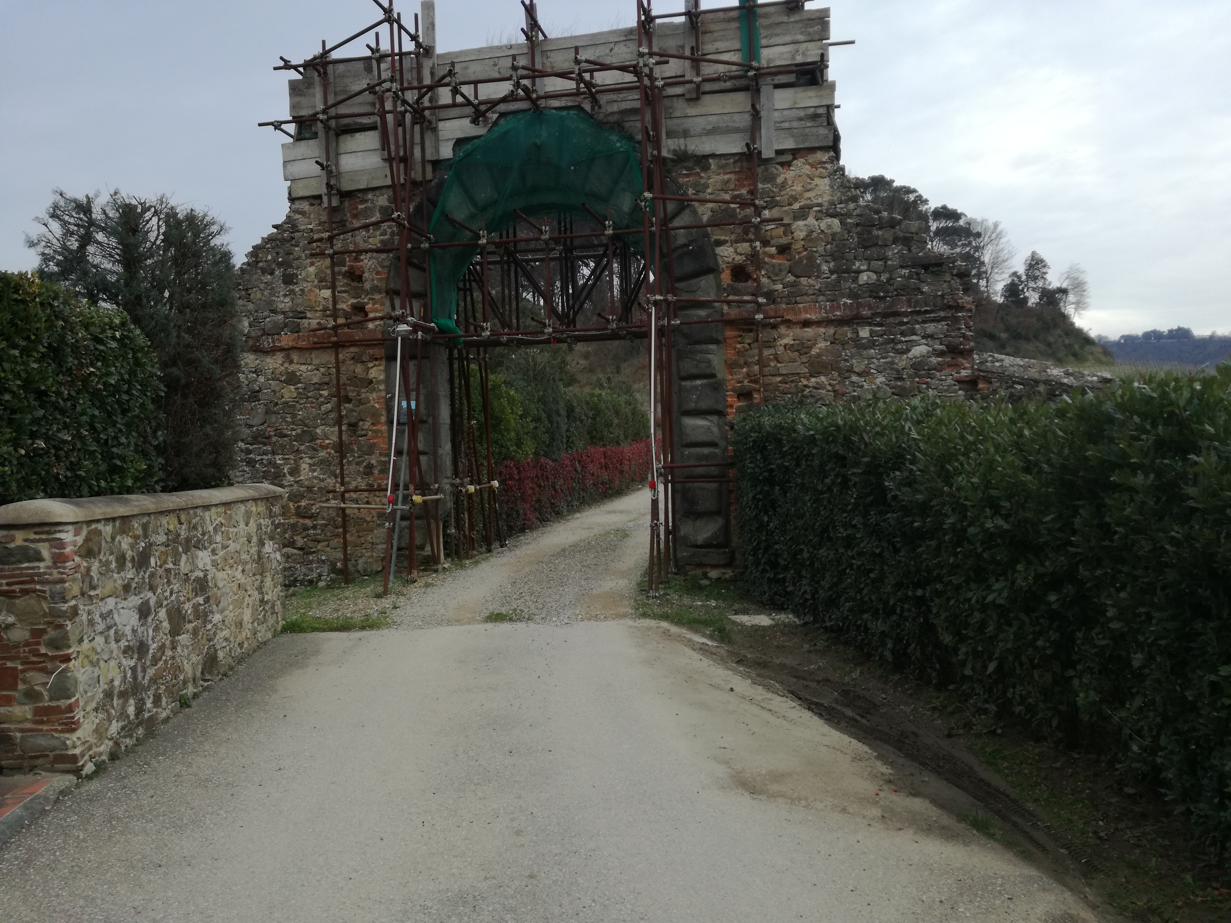 Porta Monumentale del Barchetto della Pineta in località Poggio alla Malva (PO)